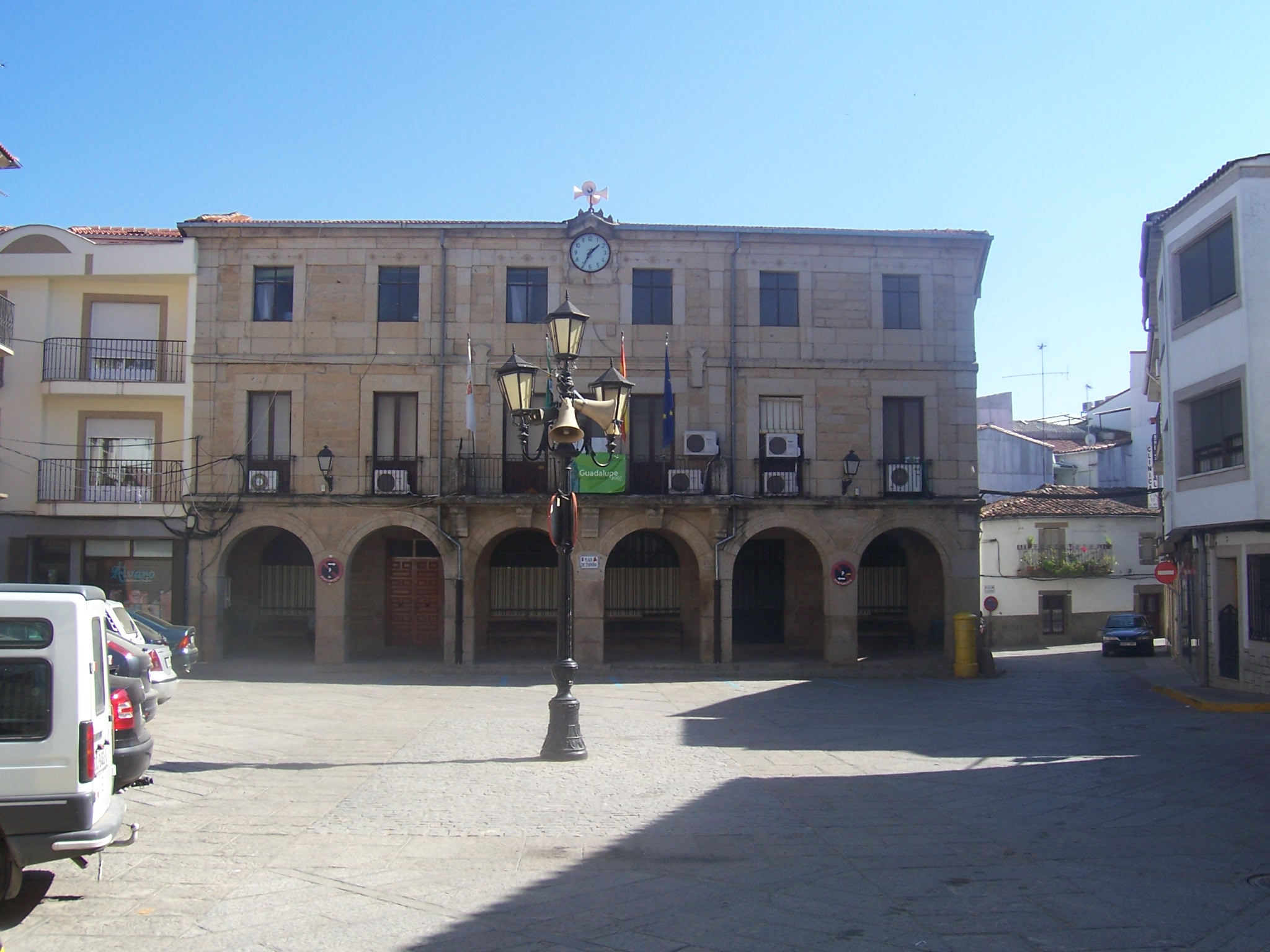 Ayuntamiento de Montehermoso, Cáceres, España